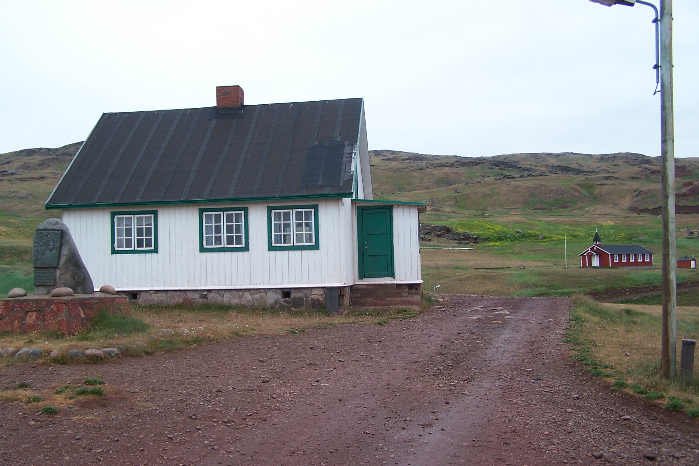 I dette hus boede Frederiksen, den første moderne fåreholder i Qassiarsuk. Mange af hans efterkommere bor endnu i bygden. Der er en mindesten forrest til venstre. I baggrunden til højre ses kirken.